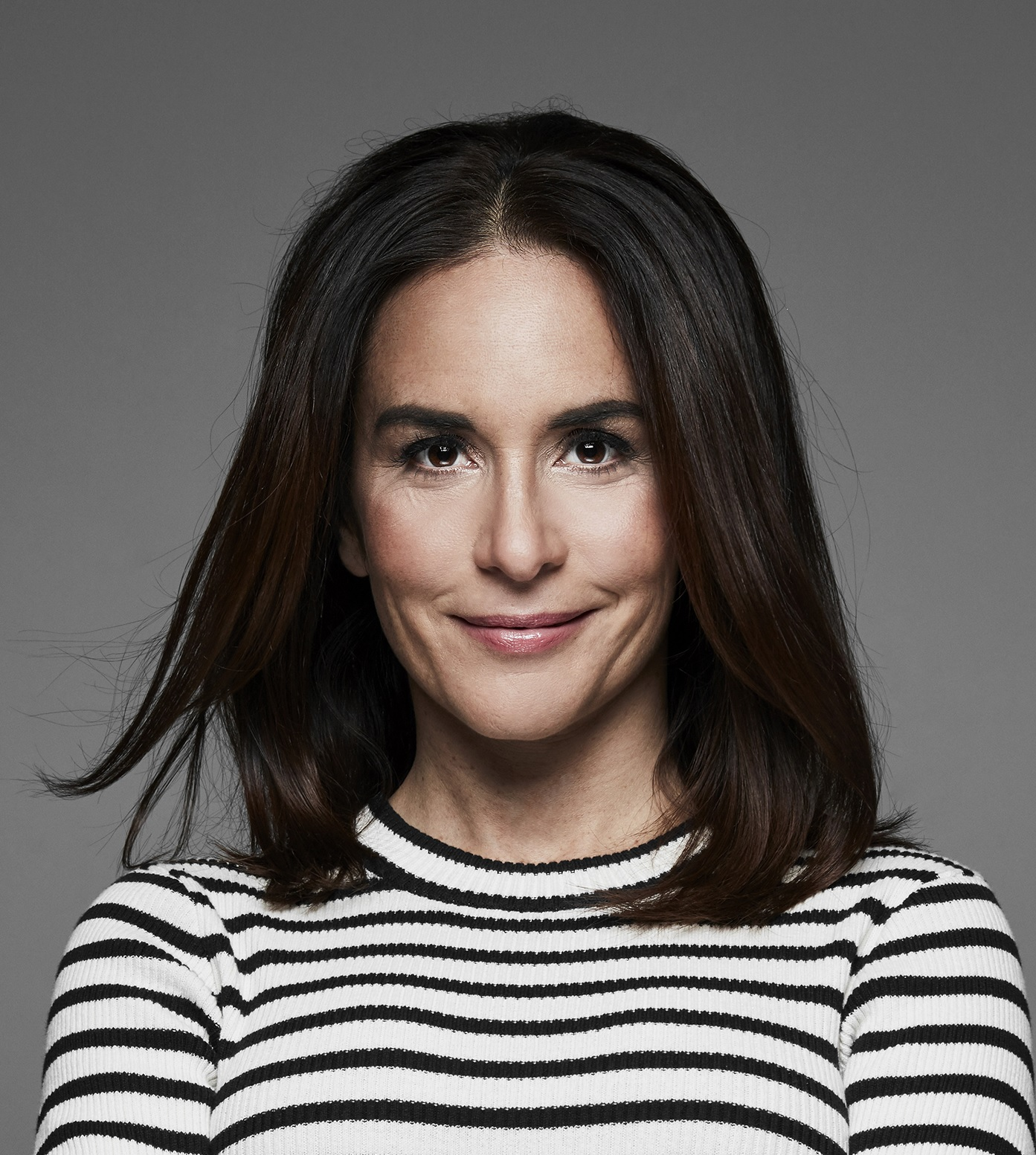 Skådespelerskan Alexandra Rapaport.